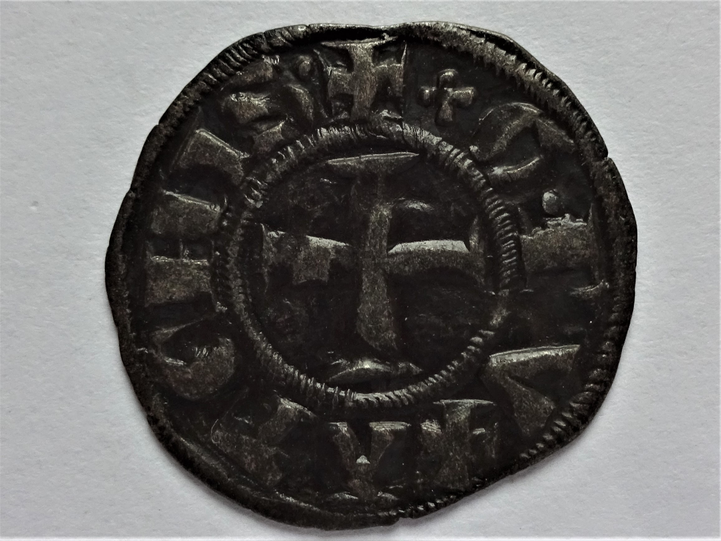 Denier tournois aus Athen zur Zeit von Guillaume I. de la Roche (1280-87), Avers